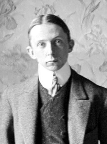 Prof. De Reynold, Chef des Vortragkurses, und seine Mitarbeiter Original: Negativ; Glasplatte; Silberbromid; 13x18cm Signatur: CH-BAR#E27#1000/721#14095#1961*